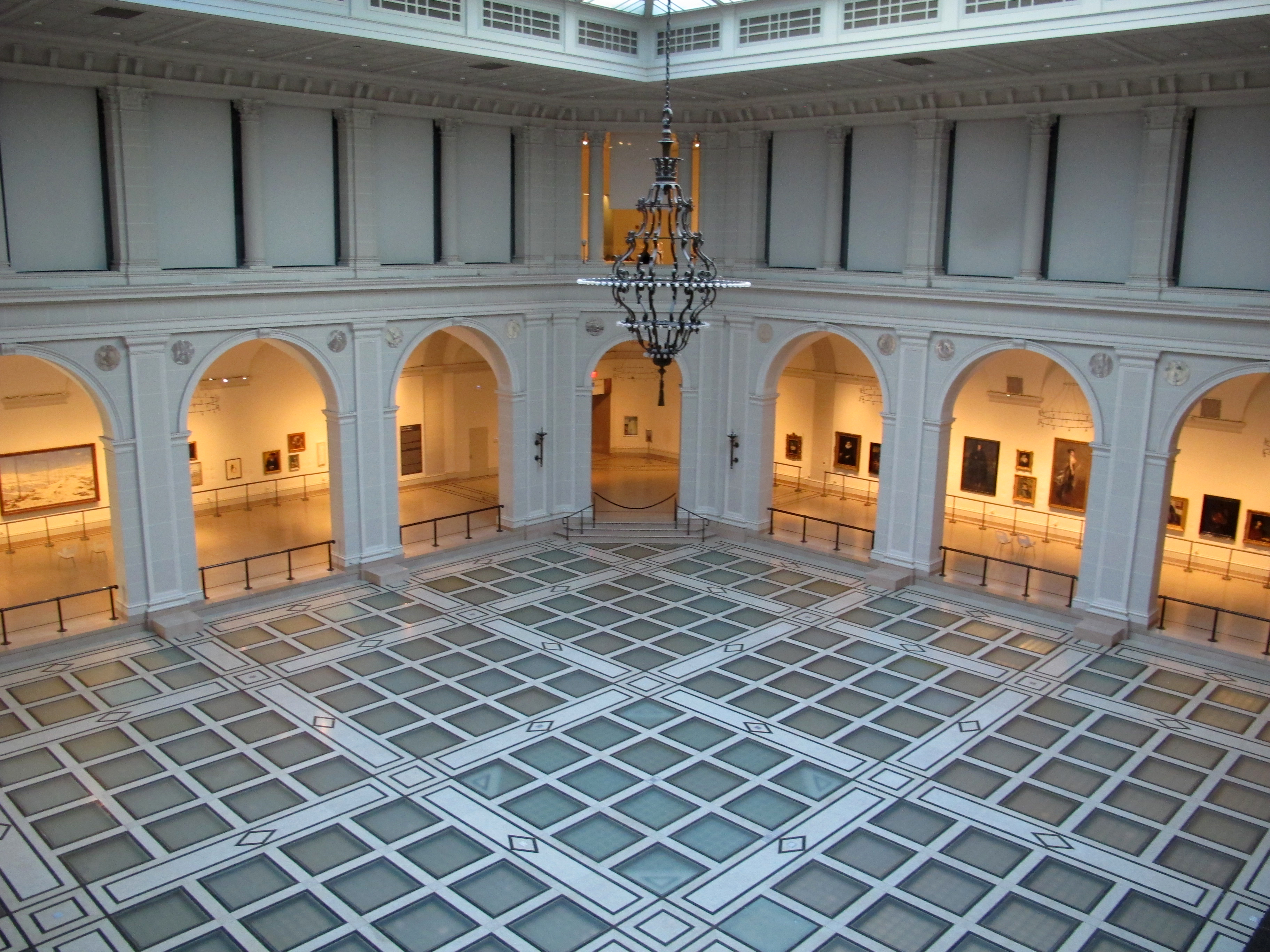 Brooklyn Museum